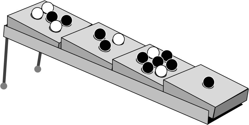 Croquis pour expliquer le jeu Apagos.